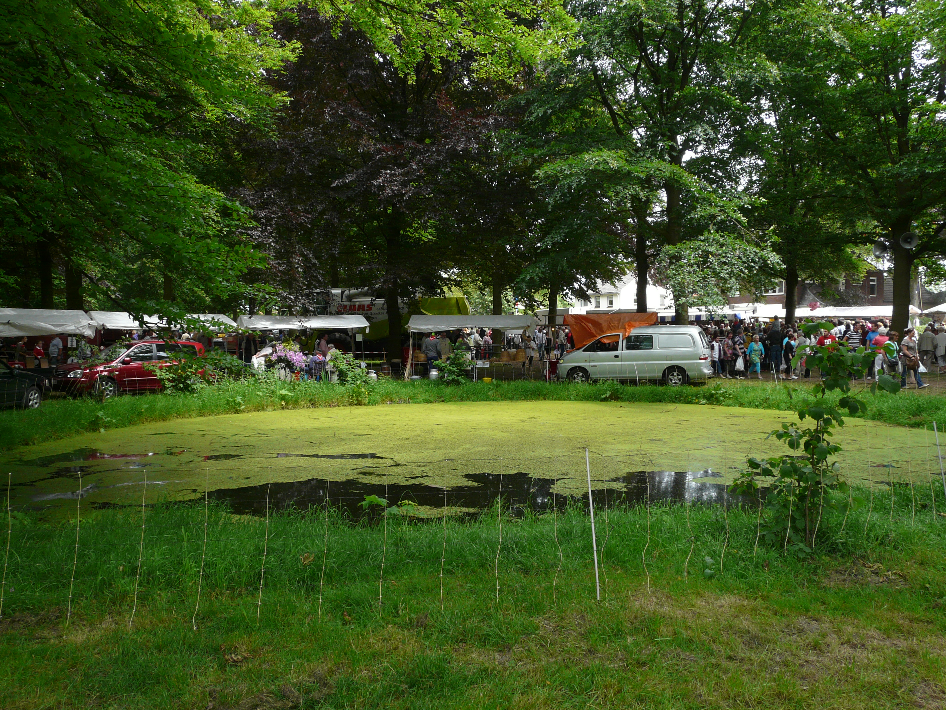 Jaarmarkt op de Houtse Heuvel in Den Hout